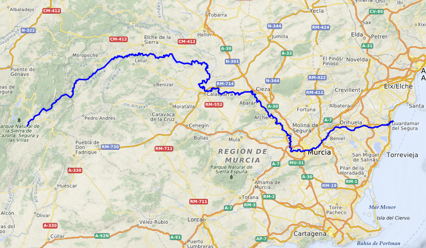 carte réalisée sur umap This map may be incomplete, and may contain errors. Don't rely solely on it for navigation.